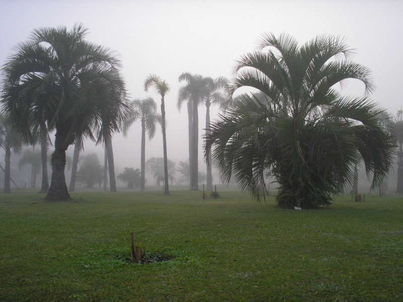 Palmeiras numa manhã fria no Jardim Botânico de Curitiba, PR, Sul do Brasil.